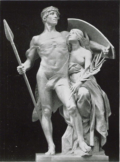 Standbild "Frieden durch Waffen geschützt" von Ludwig Manzel.